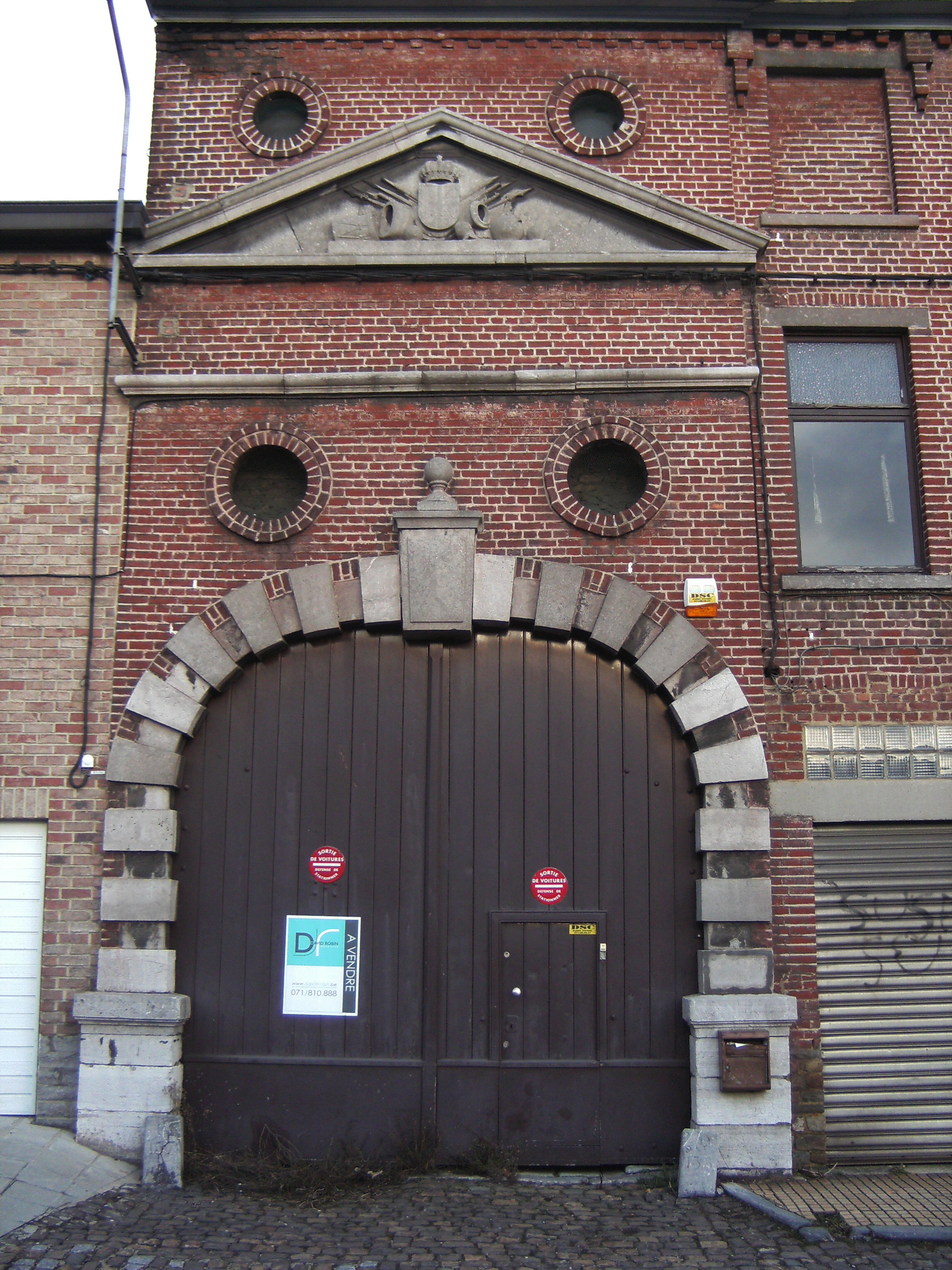 Montignies-sur-Sambre (Charleroi-Belgique) - rue Petite Aise n° 33. Éléments de la Porte de Waterloo ou de la Belle Alliance, anciennes portes des fortifications de Charleroi construites par les Hollandais en 1816. Éléments déplacés lors du démantèlement de la forteresse (1869-1872).